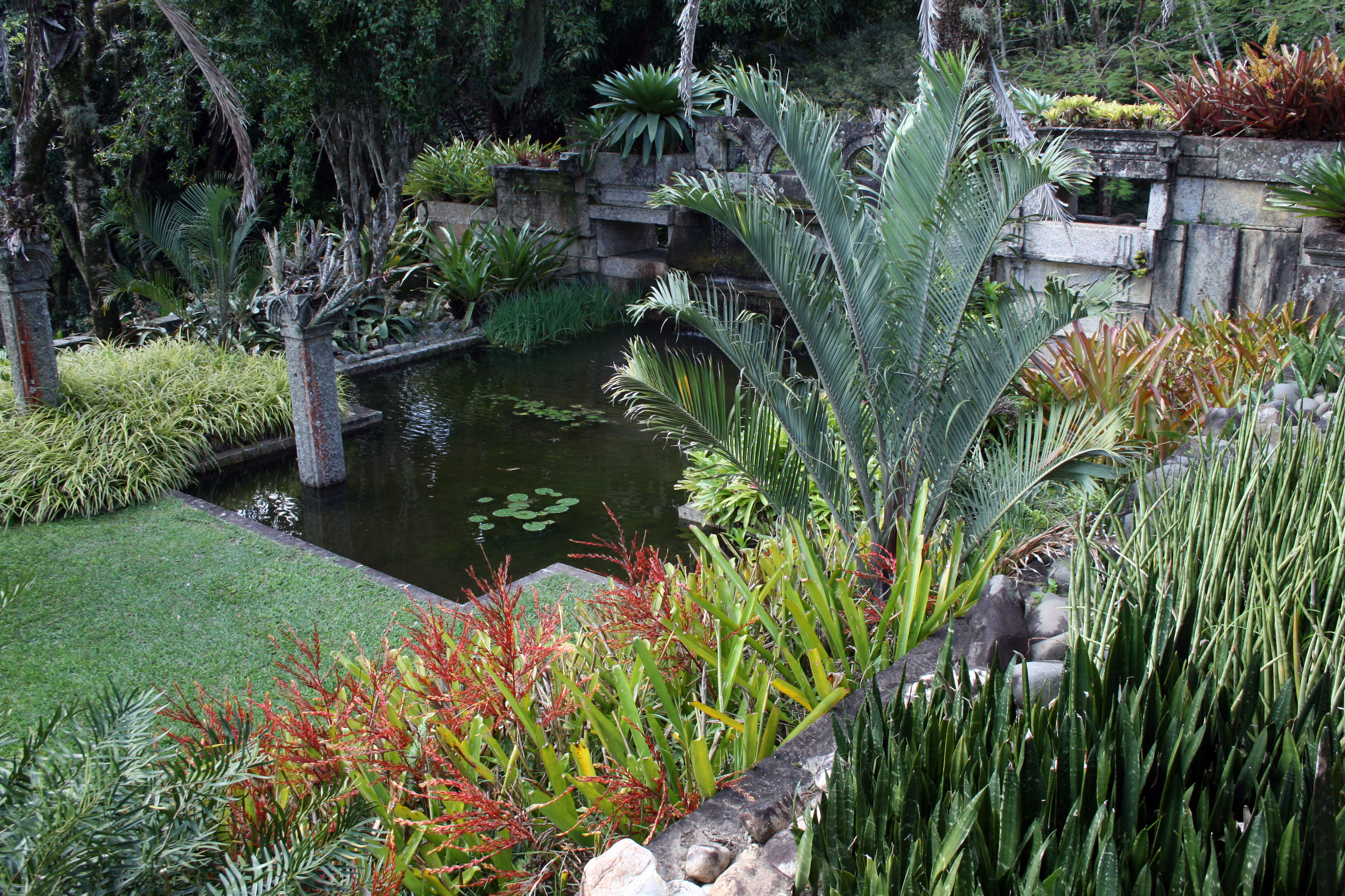 Sítio Roberto Burle Marx. Endereço: Estrada Roberto Burle Marx, nº 2019 - Barra de Guaratiba - RJ.